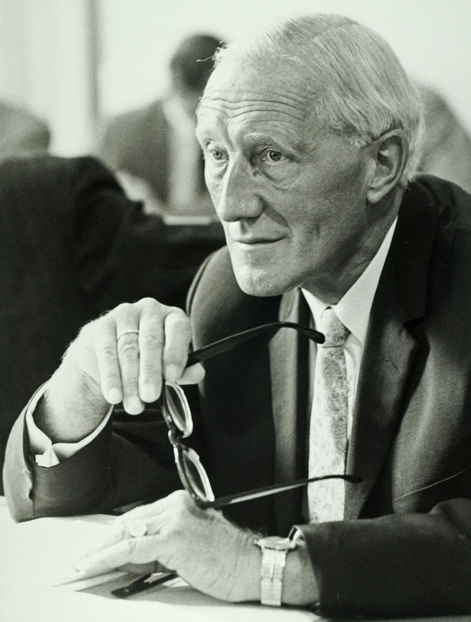 CollectieCollectie Fotoburo de BoerInventarisnummerNL-HlmNHA_5400463993 BeschrijvingHappé, W.F.FotonummerNL-HlmNHA_5400463993DocumenttypeHistorieprenten, tekeningen en foto'sVervaardigerBoer, Cees de (1918-1985) LandNederland ProvincieNoord-Holland GemeenteHaarlem PlaatsHaarlem Begindatum1968Einddatum1968TechniekFoto Plaatsinggb31